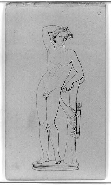 Digital ID: cph 3b38337 Source: b&w film copy neg. Reproduction Number: LC-USZ62-92010 (b&w film copy neg.) Repository: Library of Congress Prints and Photographs Division Washington, D.C. 20540 USA TITLE: Apollino CALL NUMBER: Unprocessed item [P&P] REPRODUCTION NUMBER: LC-USZ62-92010 (b&w film copy neg.) SUMMARY: Man in a fig leaf, with quiver of arrows MEDIUM: 1 drawing. CREATED/PUBLISHED: [between 1830 and 1886] CREATOR